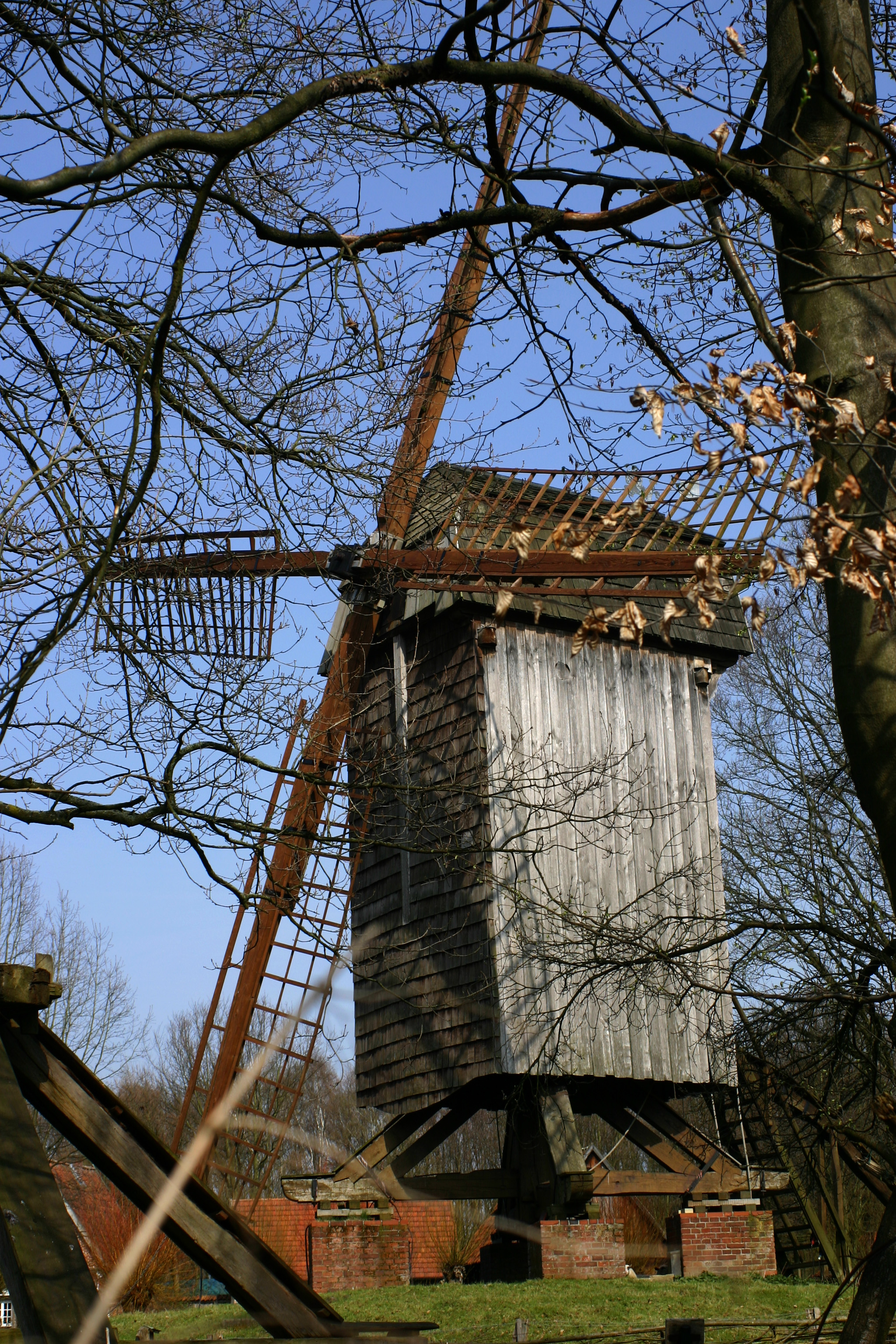 Bockwindmühle im Freilichtmuseum Mühlenhof in Münster